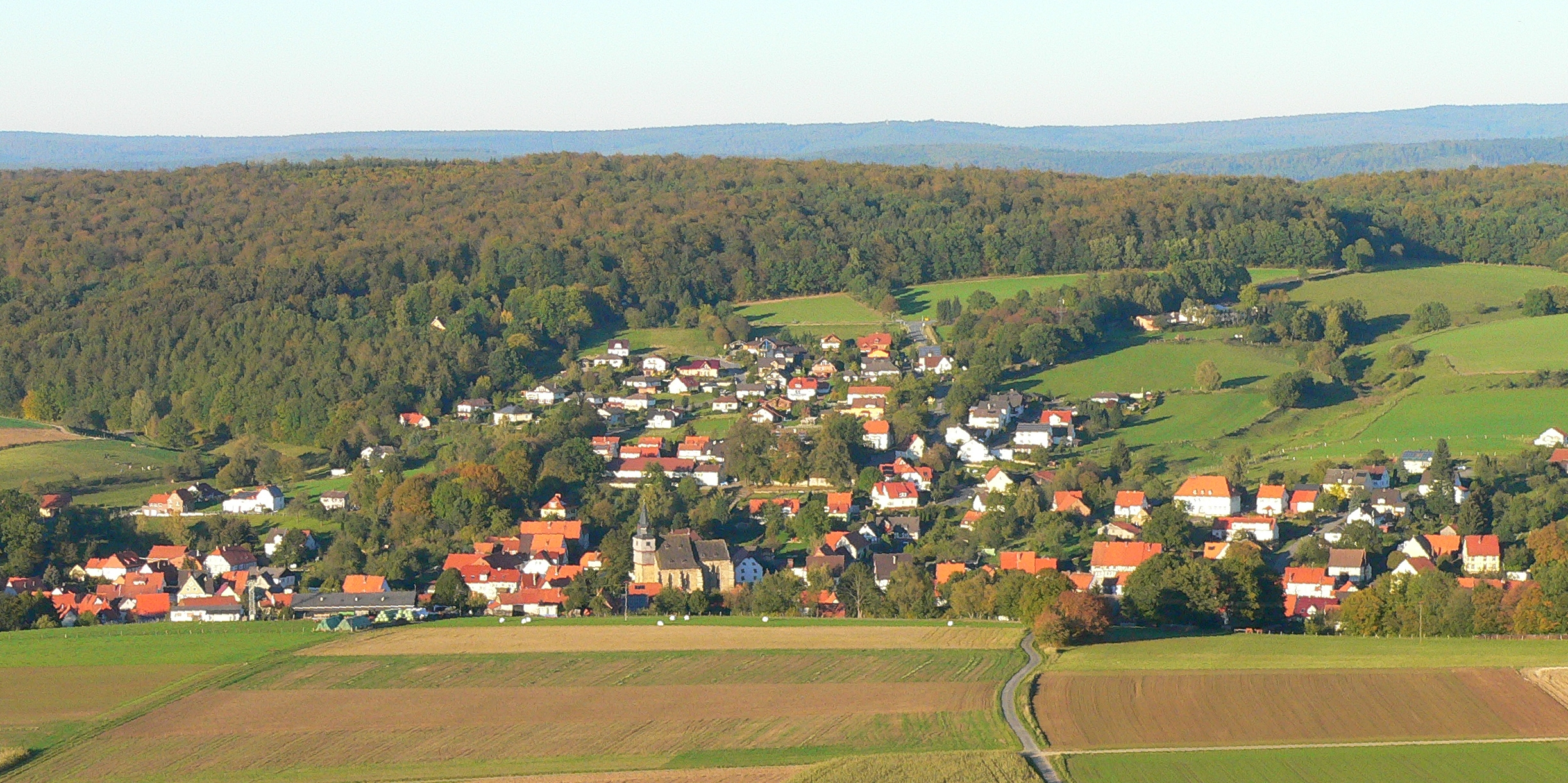 Gottsbüren im Reinhardswald, Hessen, Deutschland